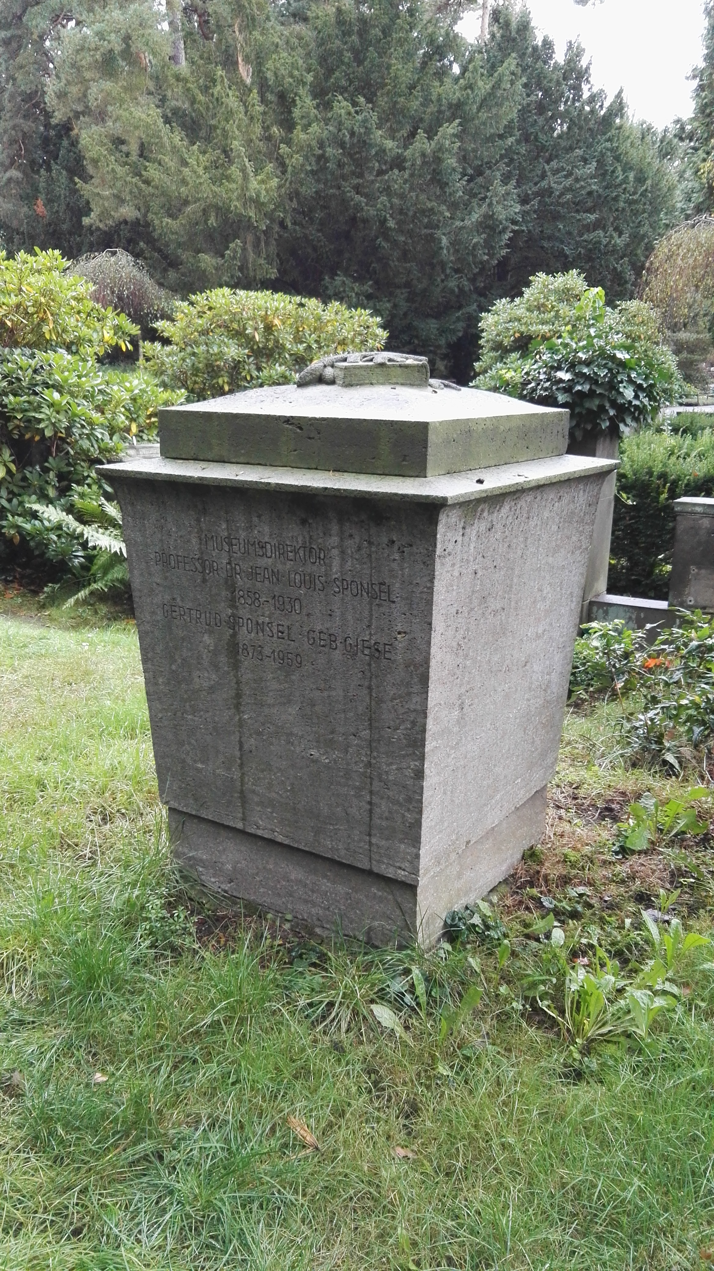 Grab von Jean Louis Sponsel auf dem Urnenhain Tolkewitz in Dresden